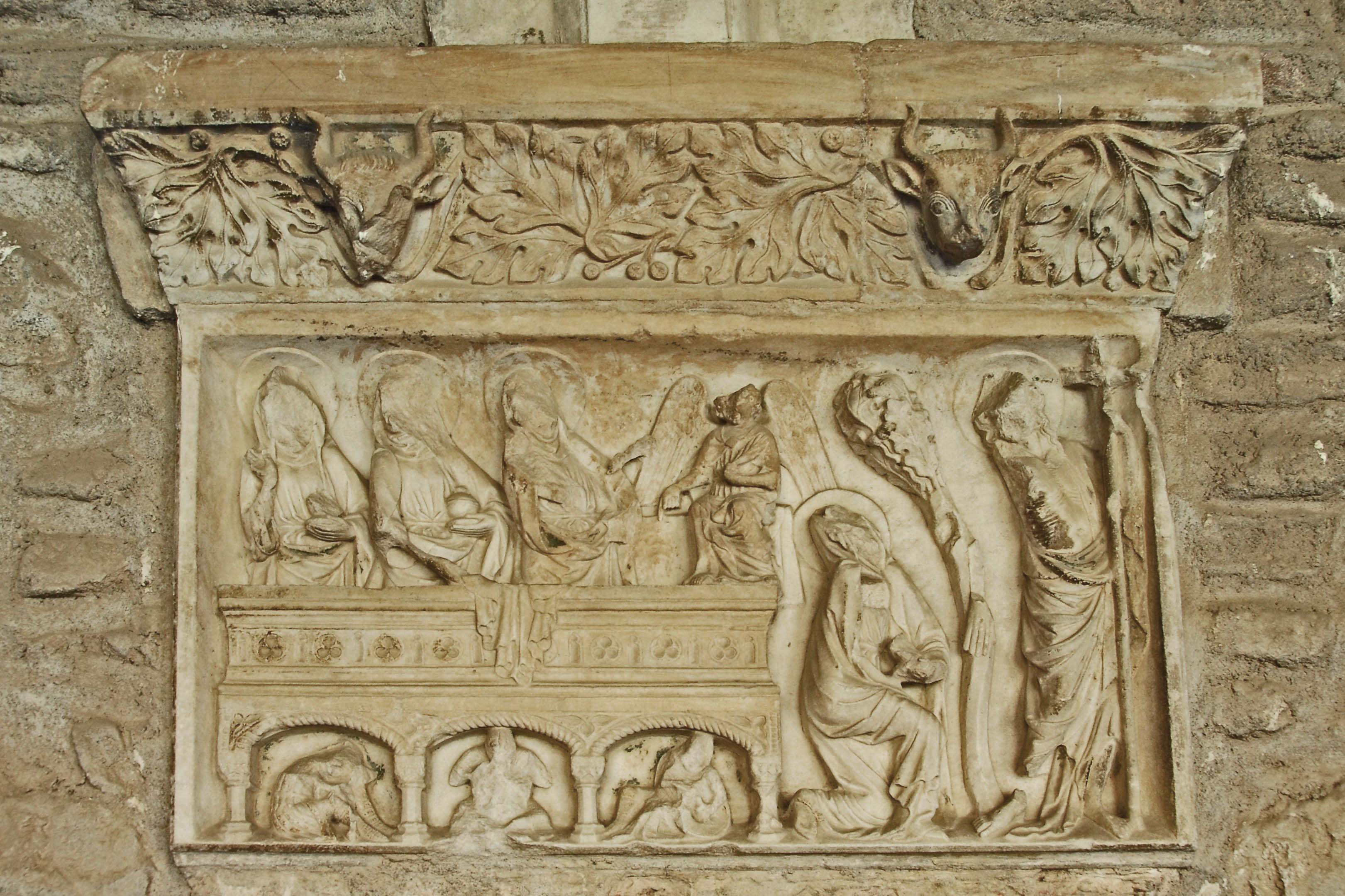 Ste-Eulalie-et-Ste-Julie_d’Elne, Tafel in Südgalerie, Frauen am Grab und Jesus mit Maria Magdalena (Noli me tangere)